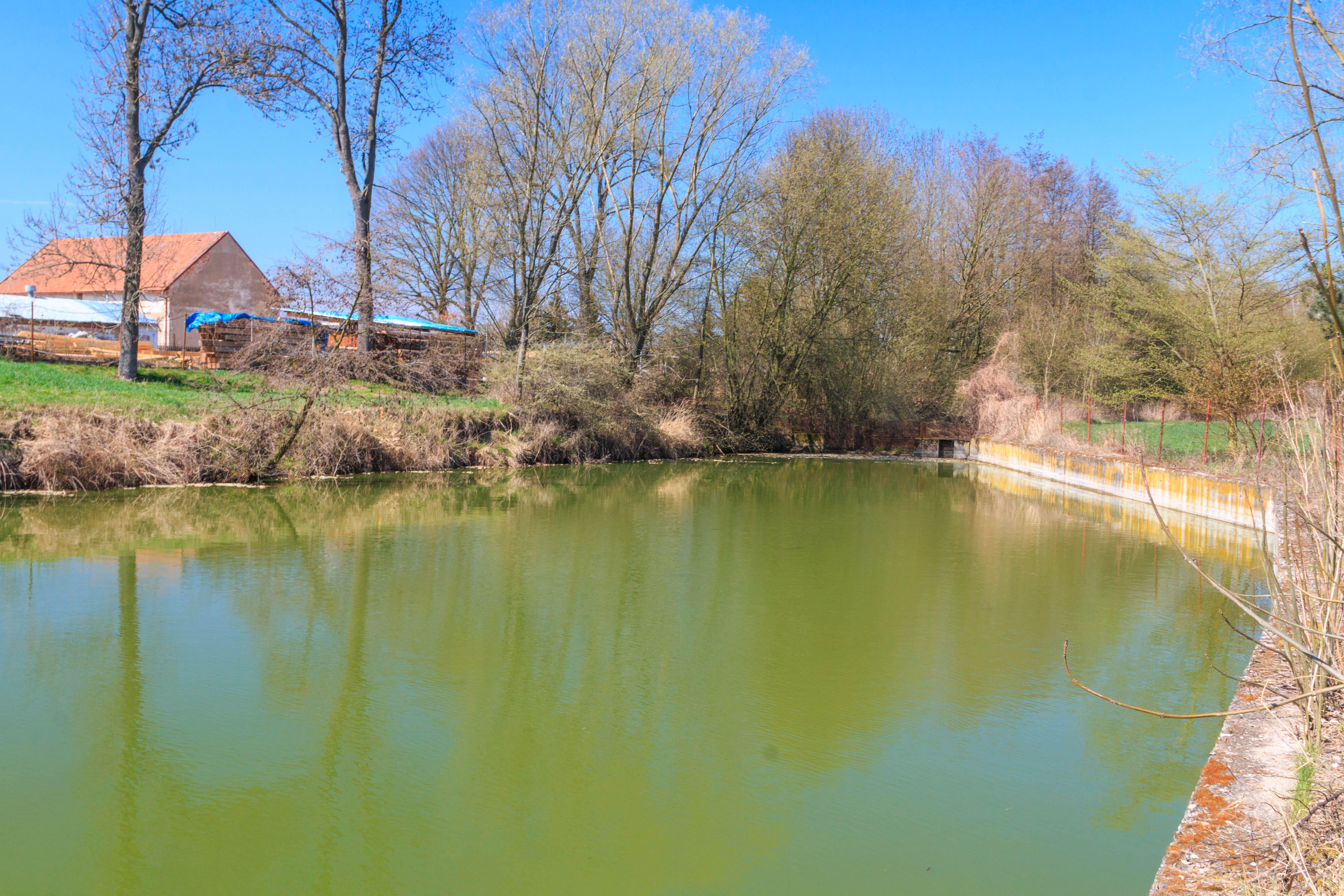 Rybník Pastouška u Řečan nad Labem Project: Vodstvo.